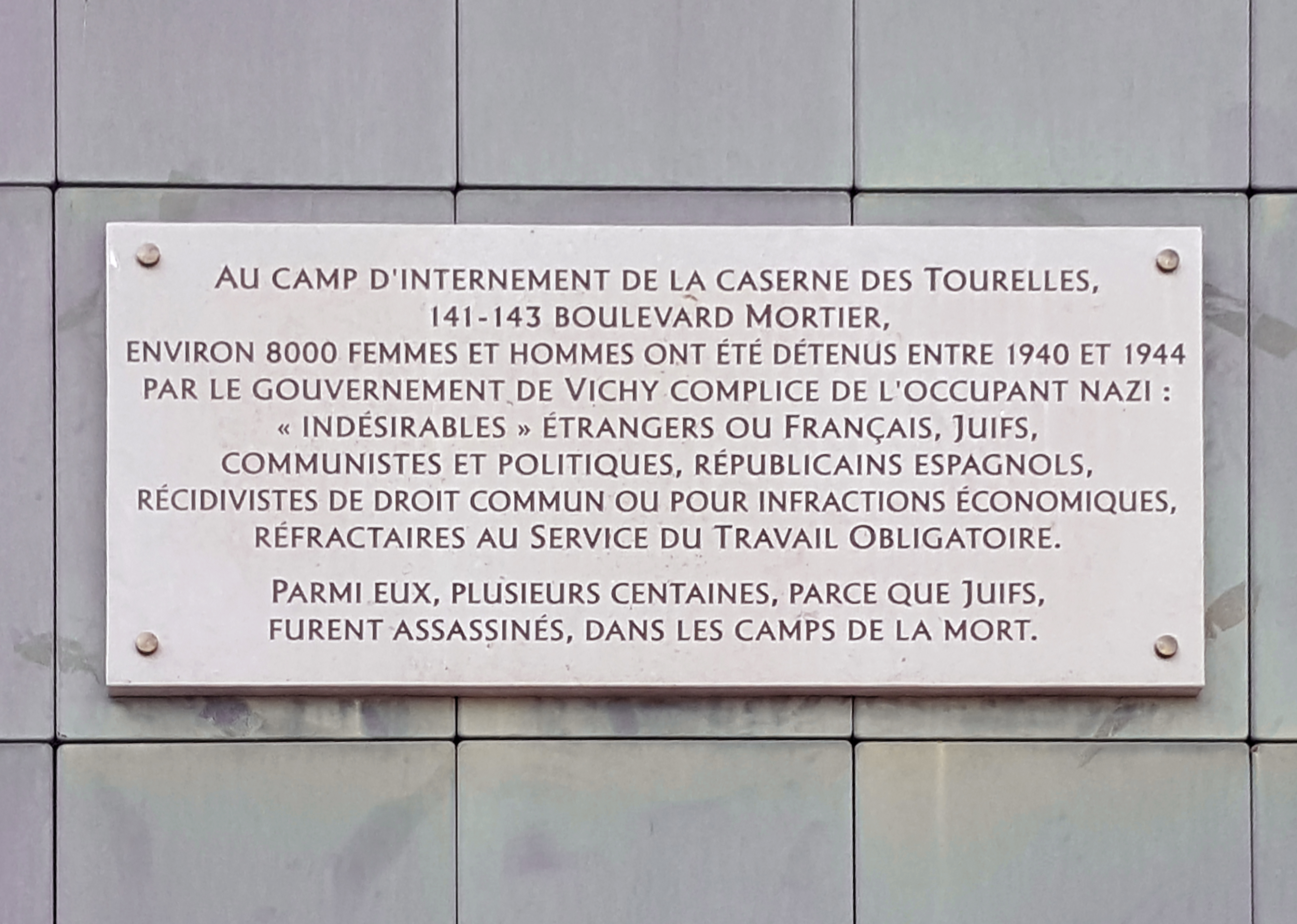 Boulevard Mortier, Paris (20e). La plaque se situe sur les murs de la piscine Georges Vallerey.